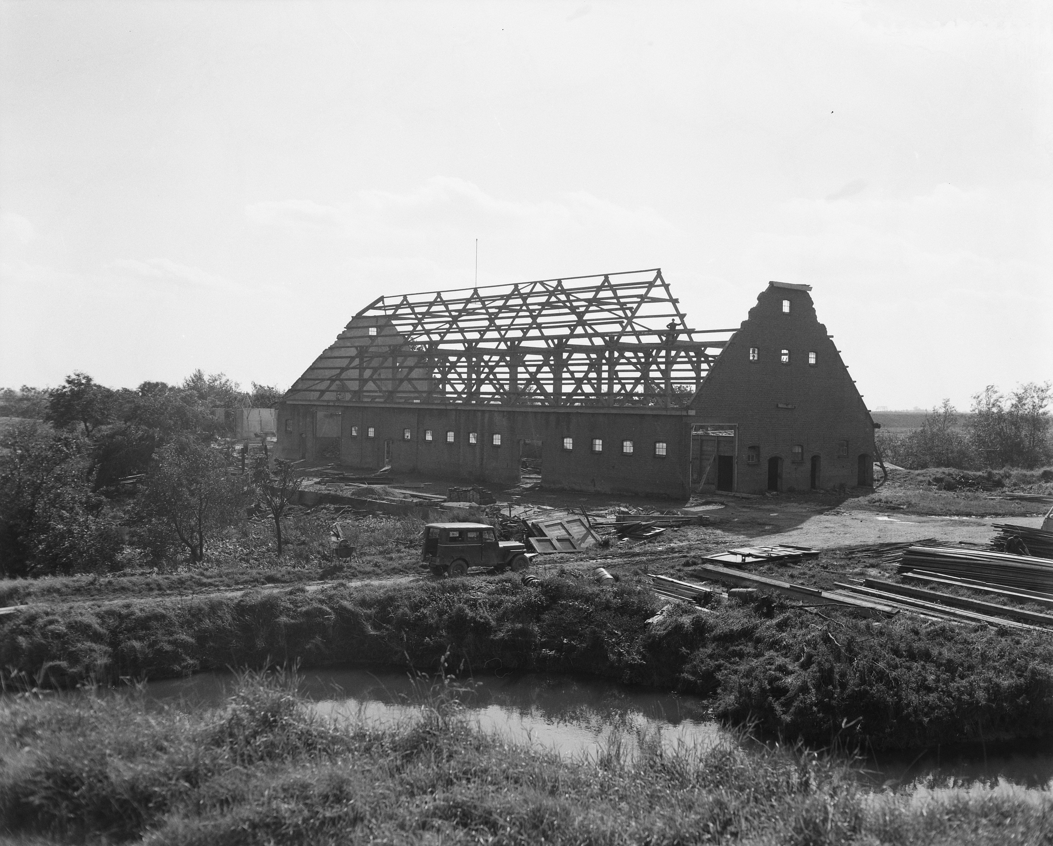 Collectie / Archief : Fotocollectie Anefo Reportage / Serie : [ onbekend ] Beschrijving : Boerderij moet wijken voor industrie te Welplaat Datum : 20 september 1957 Trefwoorden : boerderij Fotograaf : Behrens, Herbert / Anefo Auteursrechthebbende : Nationaal Archief Materiaalsoort : Negatief (zwart/wit) Nummer archiefinventaris : bekijk toegang 2.24.01.04 Bestanddeelnummer : 908-9686